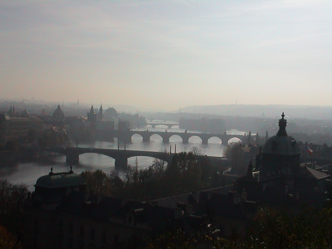 Ponts sur la Vltava a Prague.